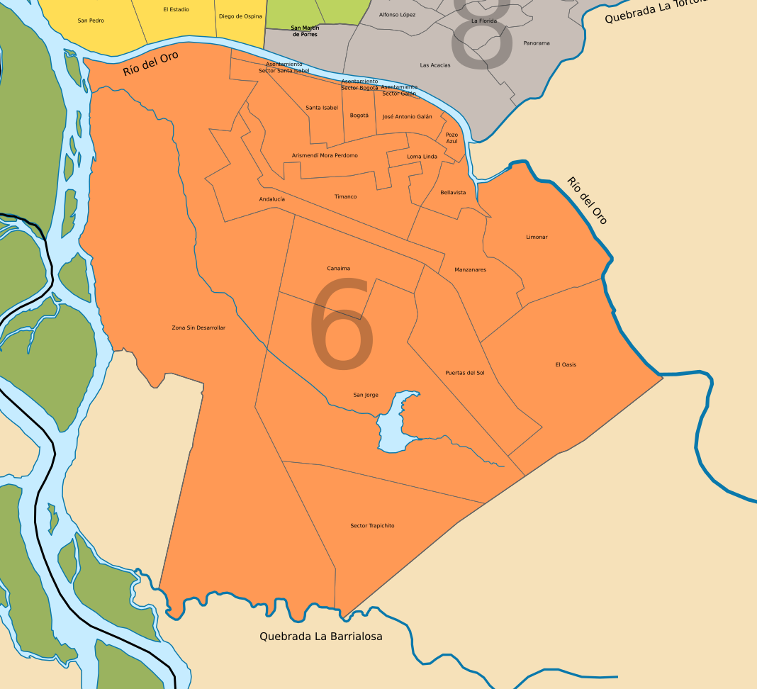 División barrial comuna 6, Neiva, departamento de Huila